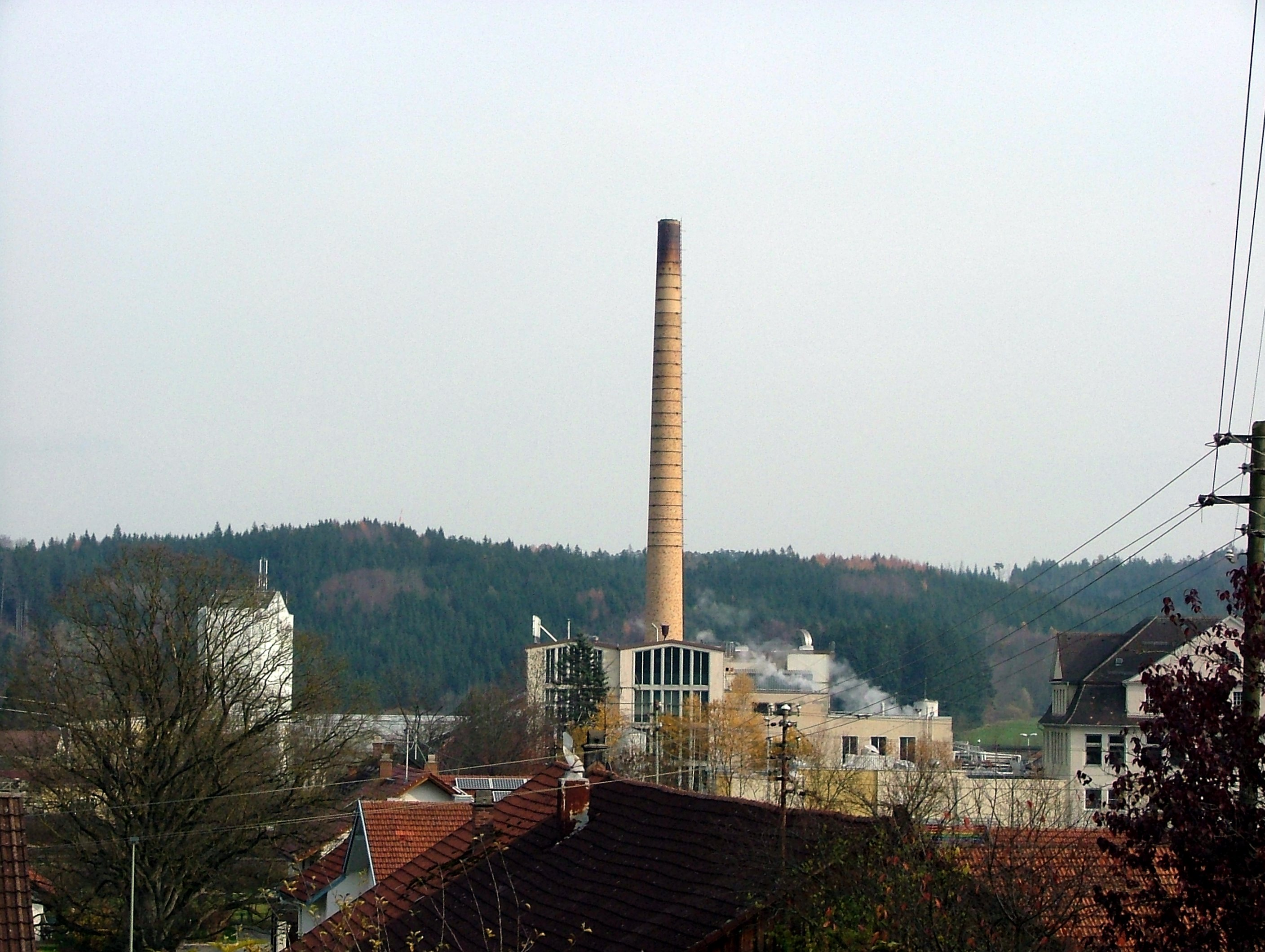 Biessenhofen, Nestlé-Werk.